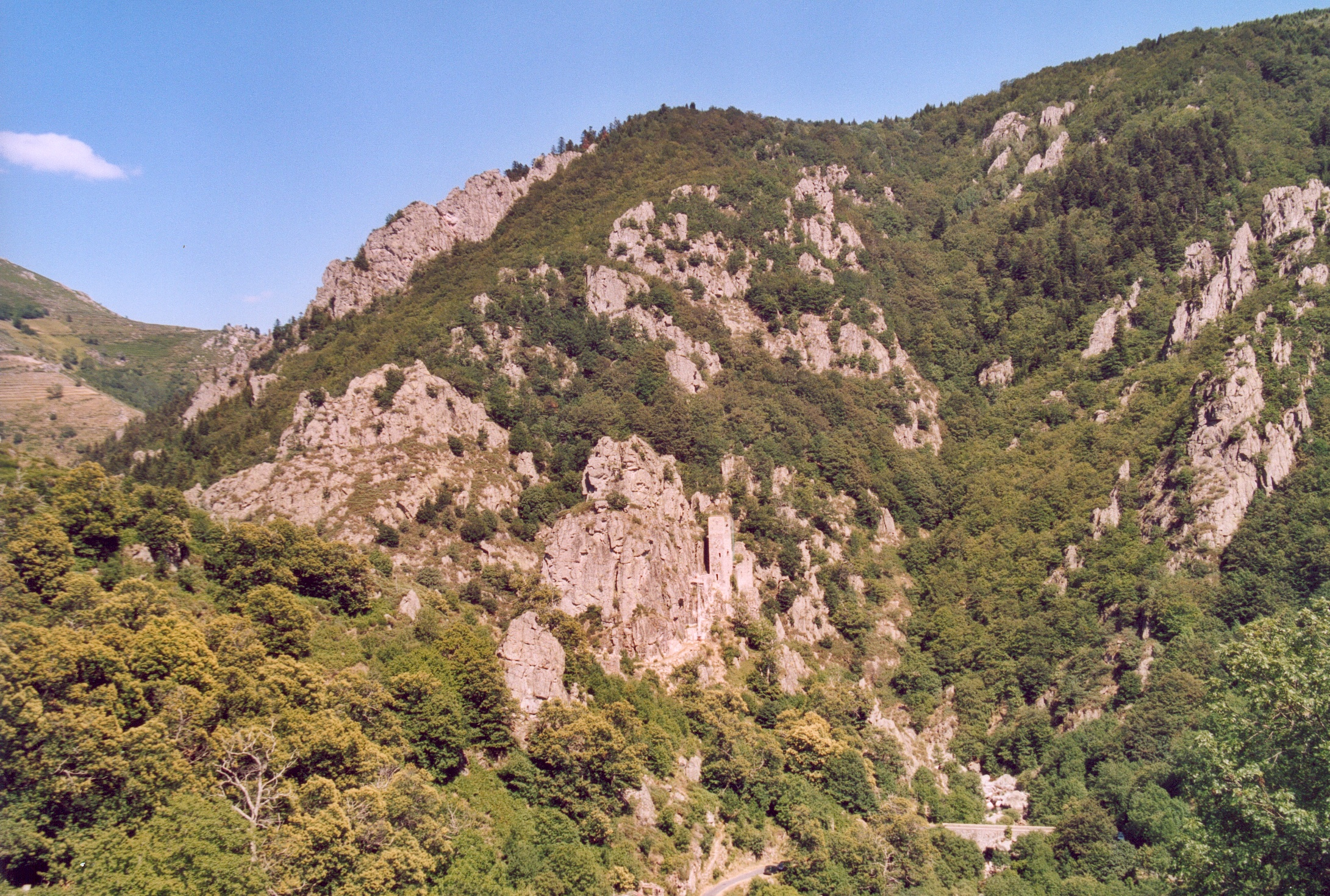 France Ardeche Borne Photographie prise par GIRAUD Patrick